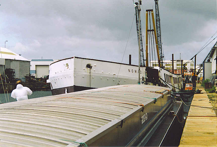 Le NOMADIC dans le port du Havre. Collection Philippe Delaunoy